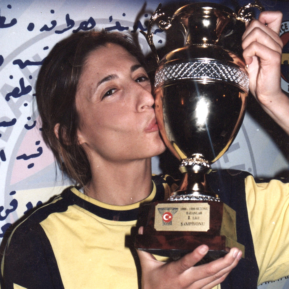 Kupa-didemakın-98